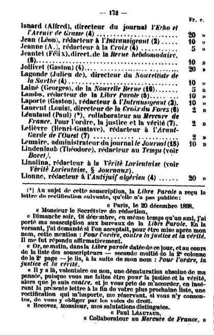 Liste de souscription au monument Henry (affaire Dreyfus 1898). Voir lettre de demande de rectification de Paul Léautaud.